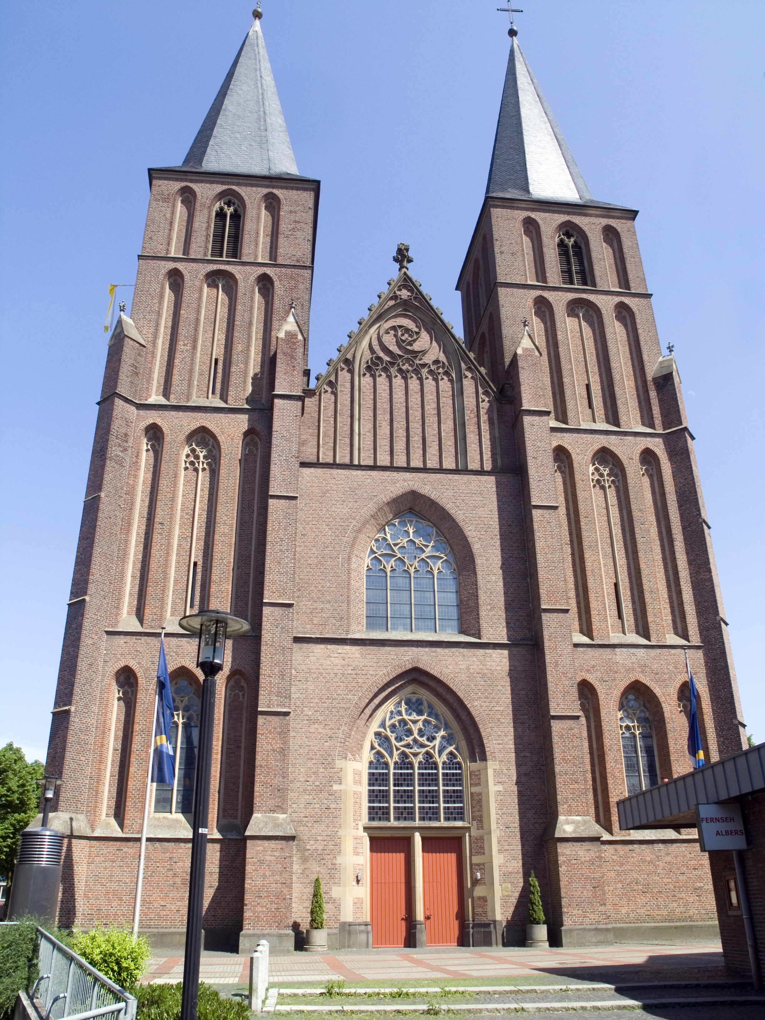 Северный Рейн-Вестфалия, Клеве – церковь Успения Девы Марии